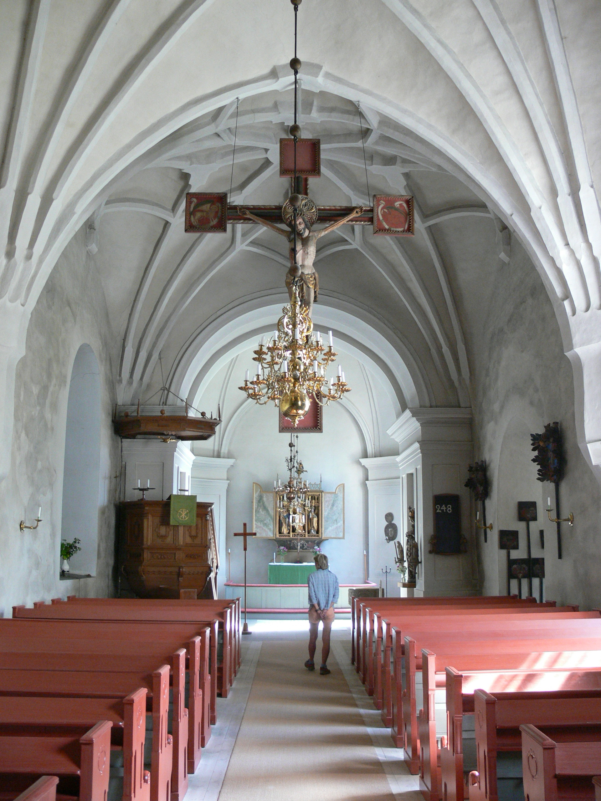 Ytterselö church. Interior